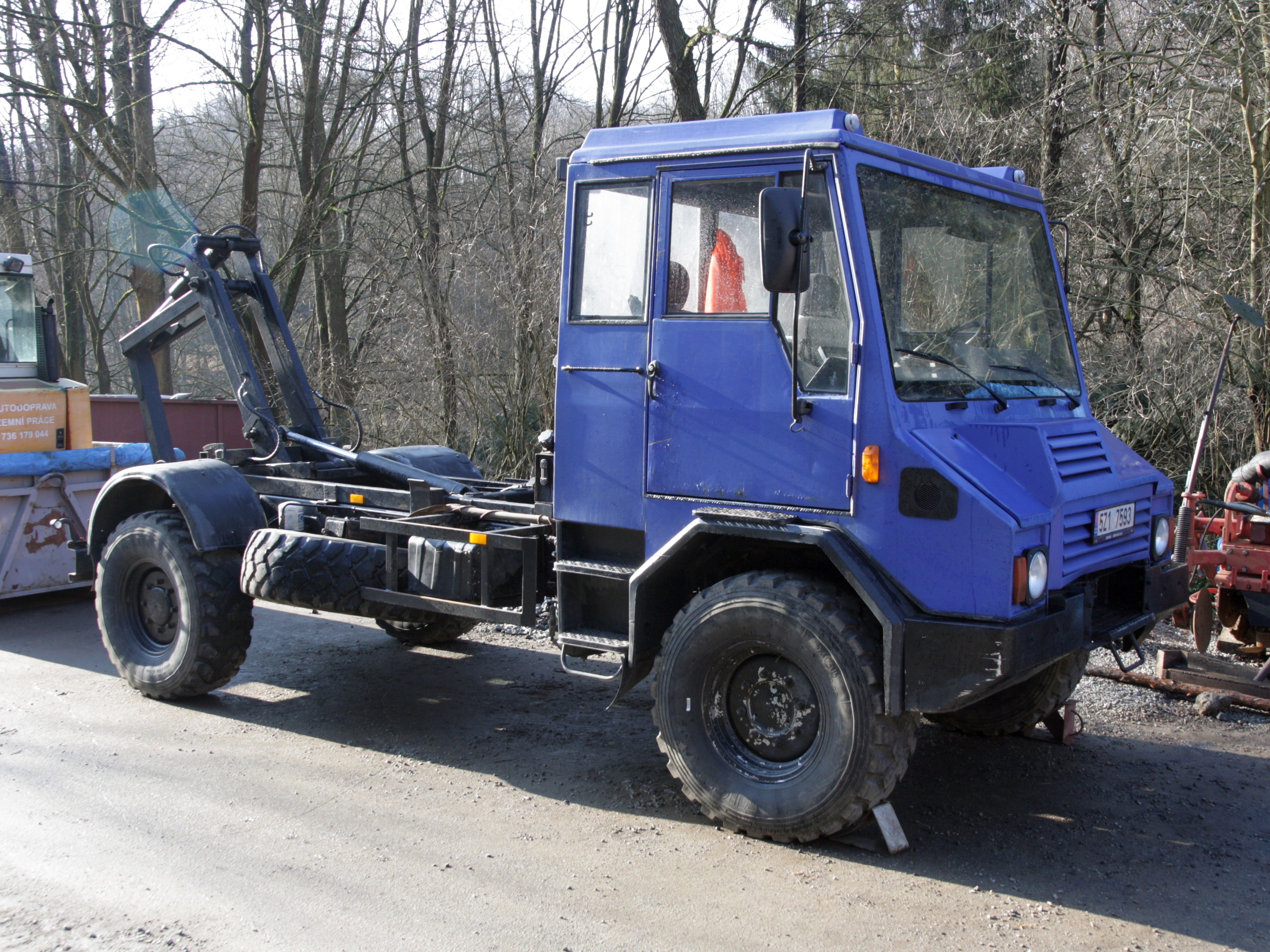 Praga UV80 nosič kontejnerů u obce Kuroslepy, okres Třebíč.